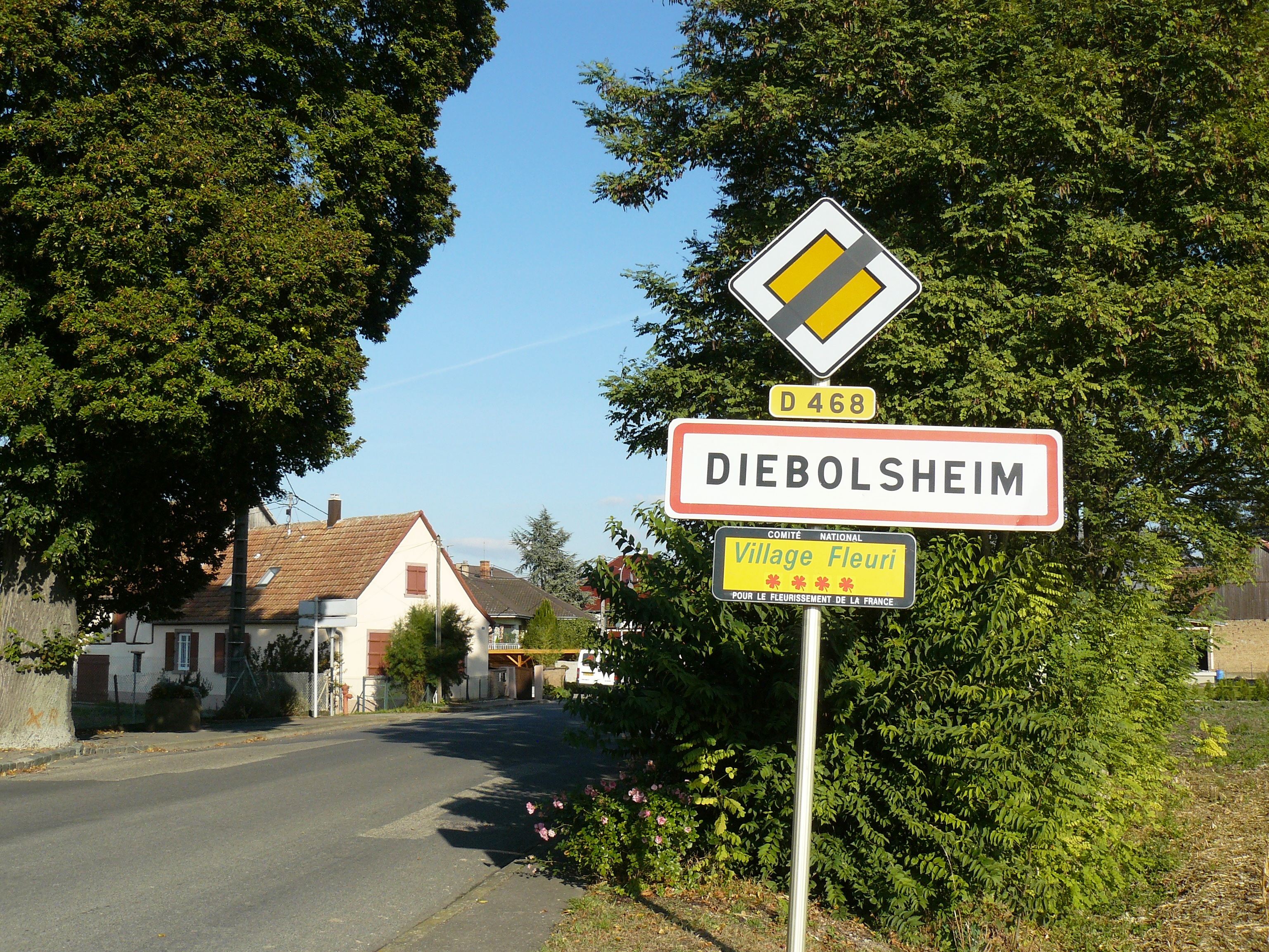 Entrée du village de Diebolsheim